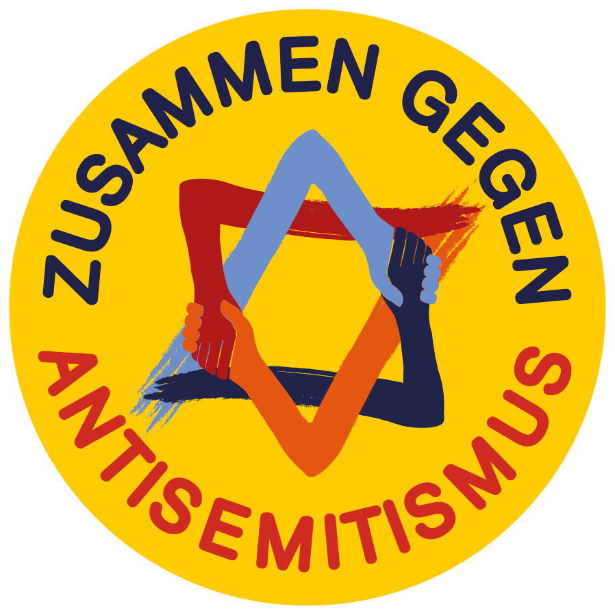 Logo der Aktion des Bistums Osnabrück gegen Antisemtismus